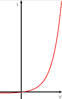 יצרתי בעצמי